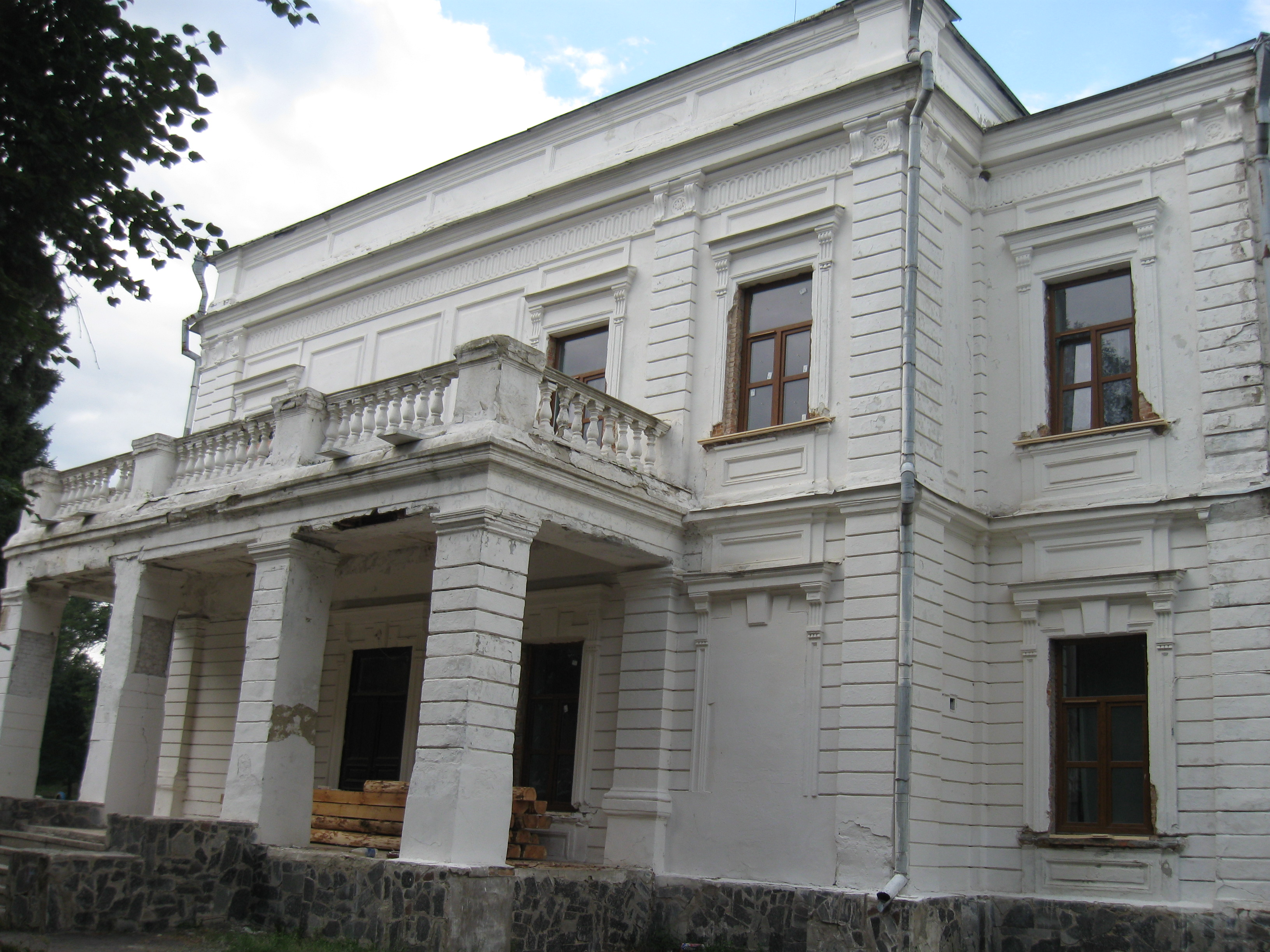 Андрушівський_палац_Терещенків_(5).jpg: Палац Терещенків у місті Андрушівці (райцентр Житомирської області), серпень 2010 року